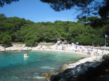 Suncana Uvala bay in Mali Losinj, Croatia / Suncana uvala u Malom Losinju